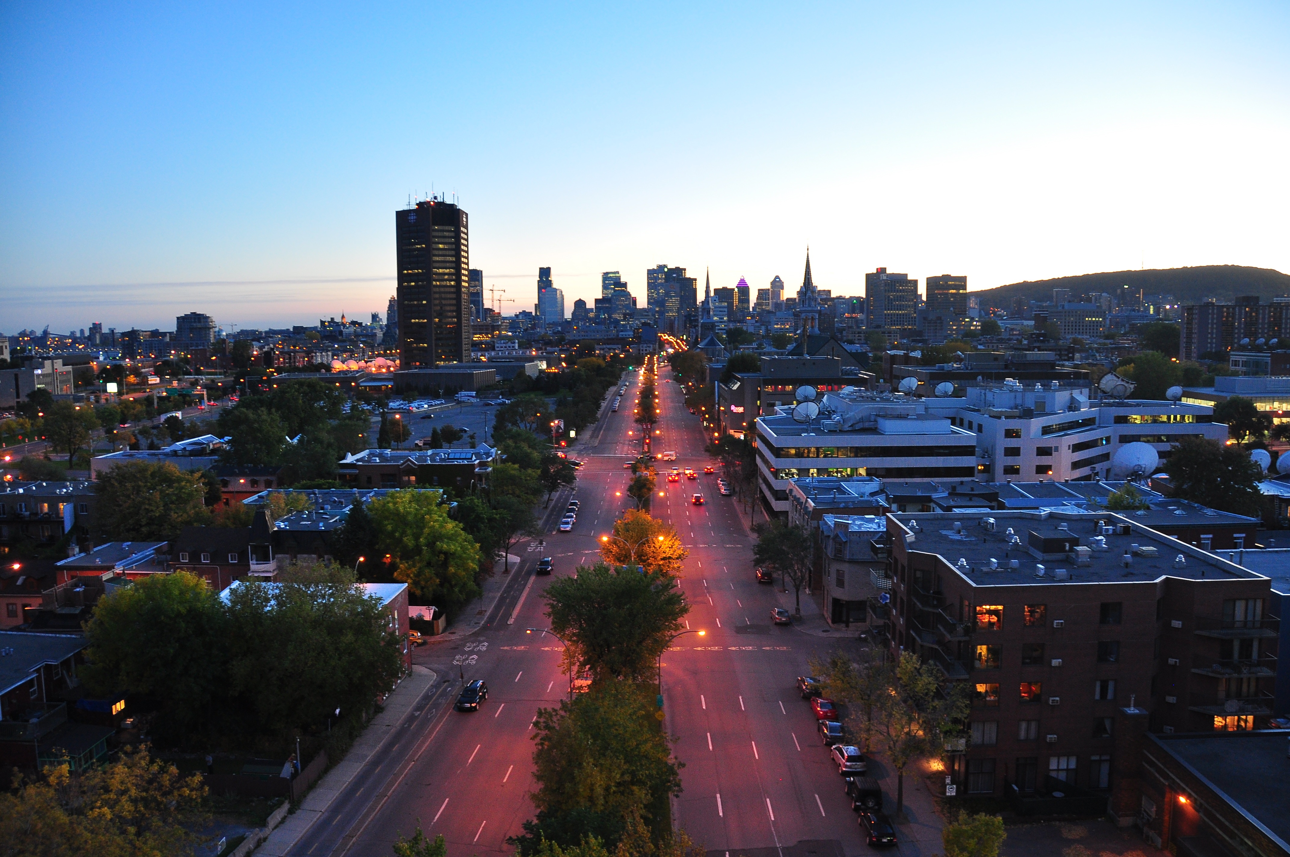 Montréal